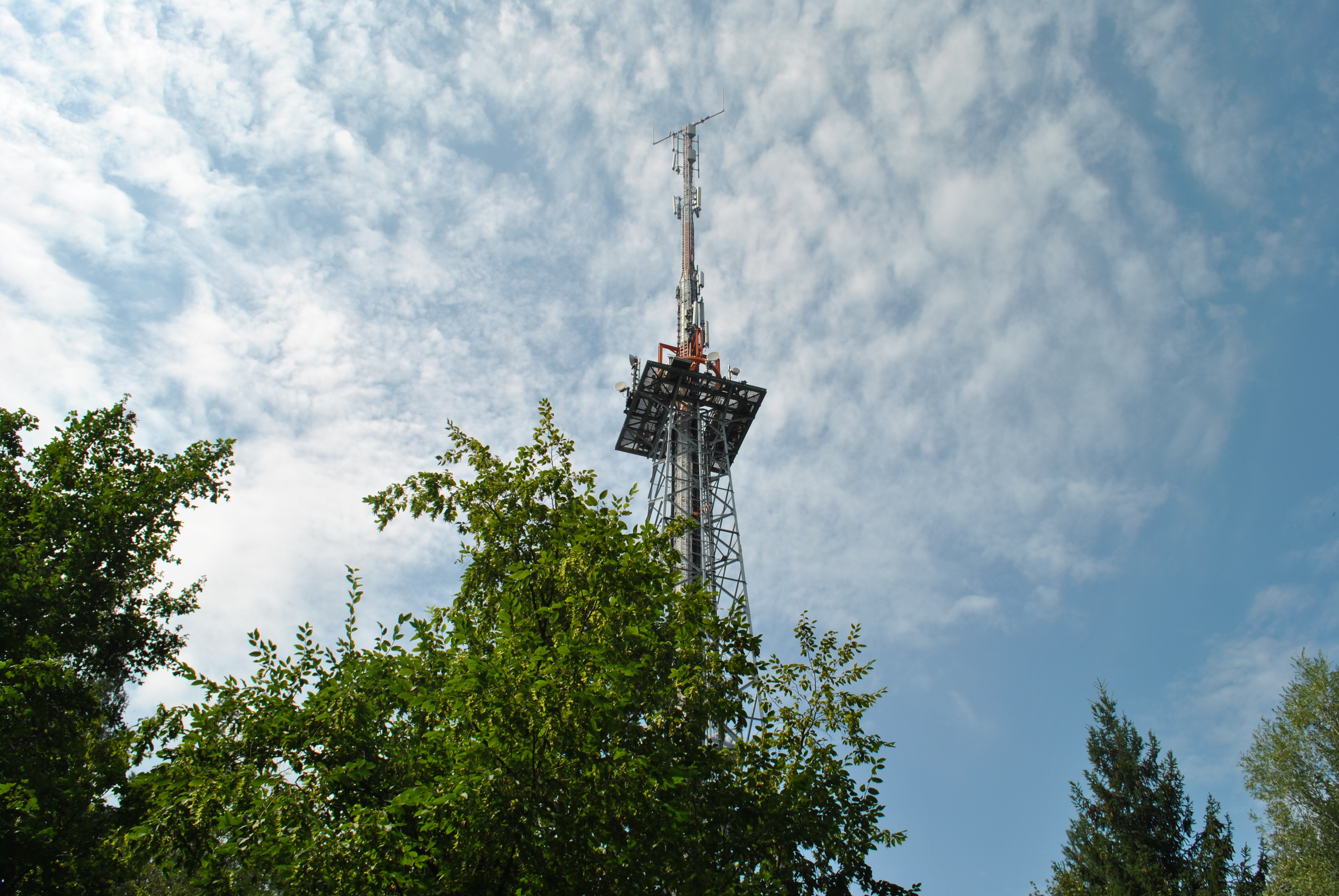 Sendemast Abtswind-Friedrichsberg, wohl mit darunterliegendem Bunker